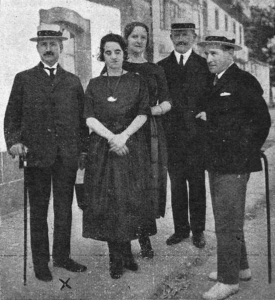 Celestino Sánchez Rivera coa colonia estranxeira en Cuntis, fotografía en Vida Gallega 1921